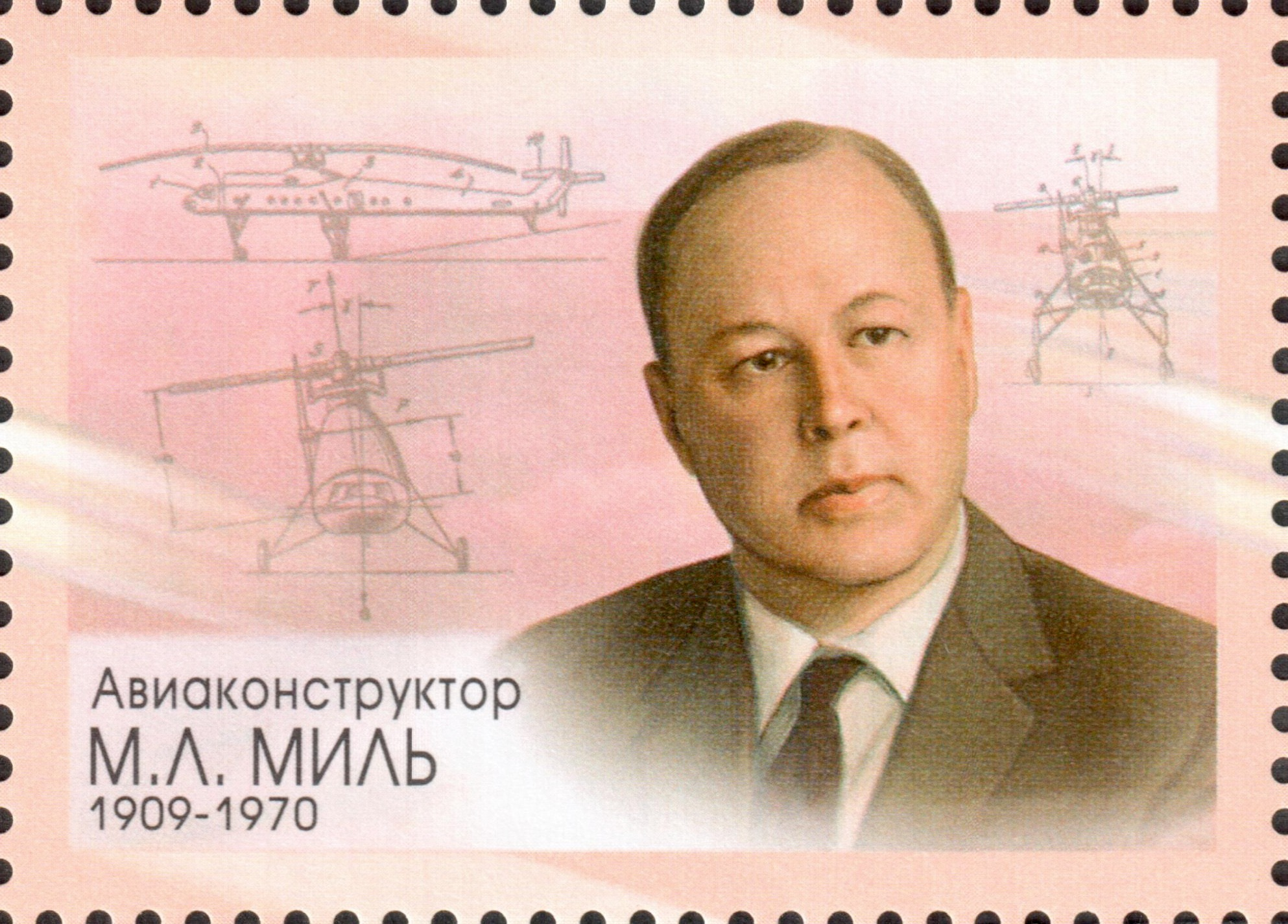 Почтовая марка России - Миль Михаил Леонтьевич, Герой Социалистического Труда